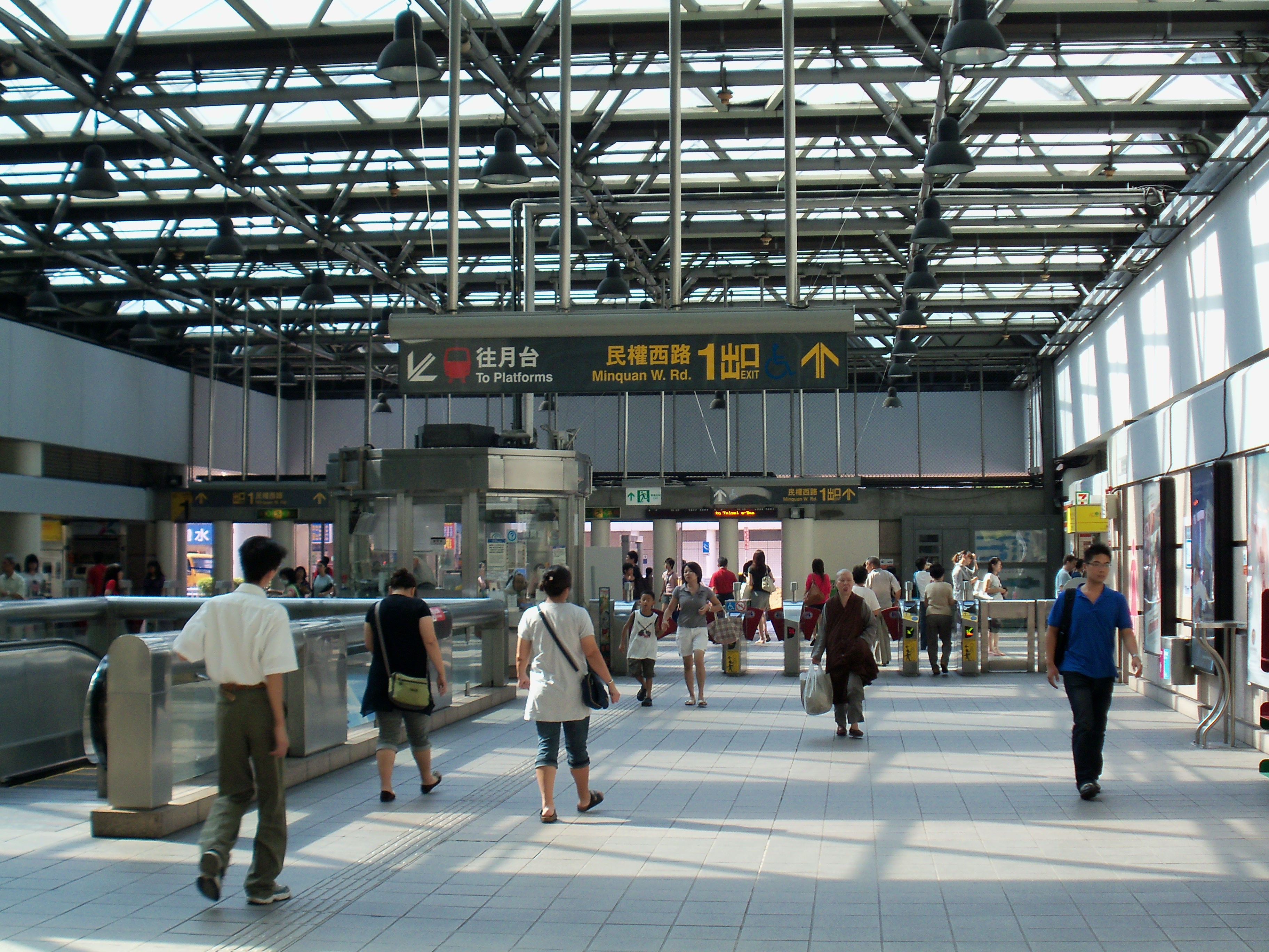 台北捷運淡水線民権西路駅の改札口とコンコース。